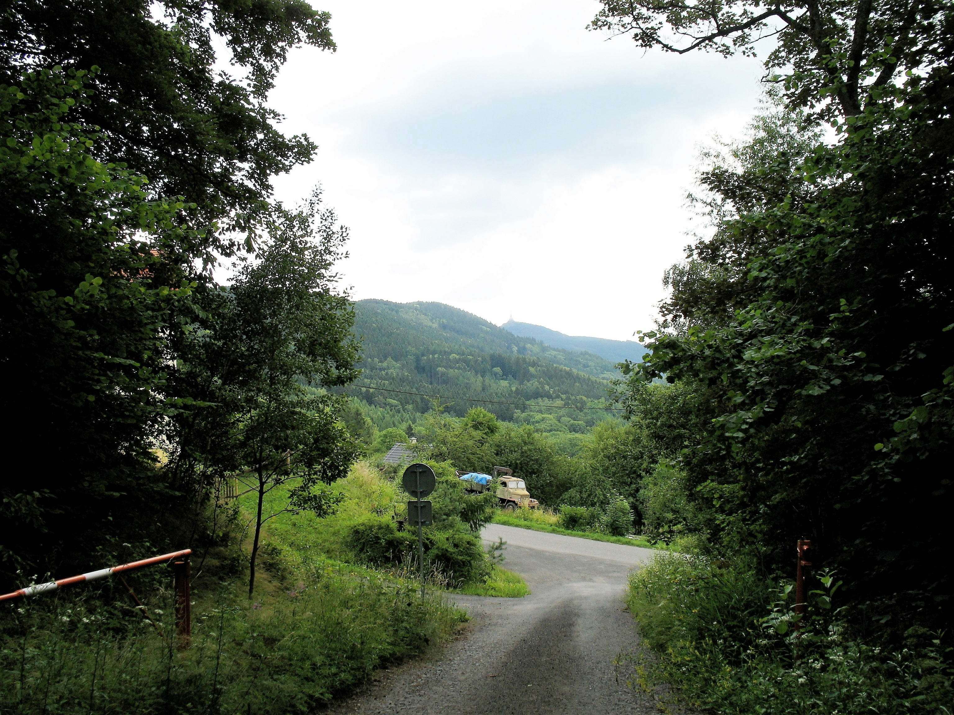 Solvayův lom u Křižan. Odbočka cesty z Křížan, v pozadí Ještěd